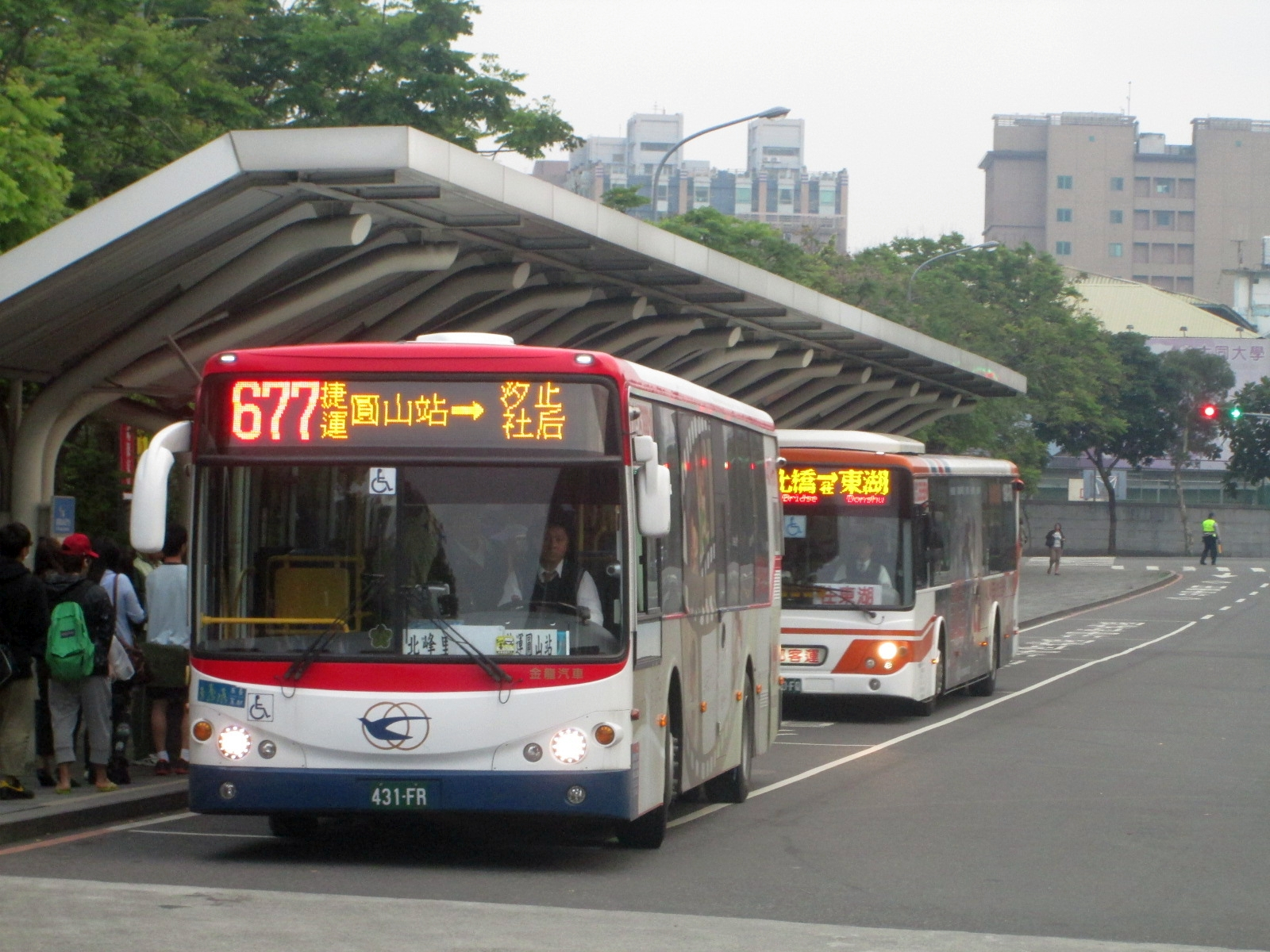 中文（台灣）: 光華巴士的金龍汽車低地板公車431-FR，行駛於臺北聯營公車677路線。